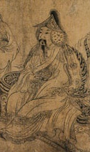 元代周朗所繪《佛郎國貢馬圖》中的元惠宗。